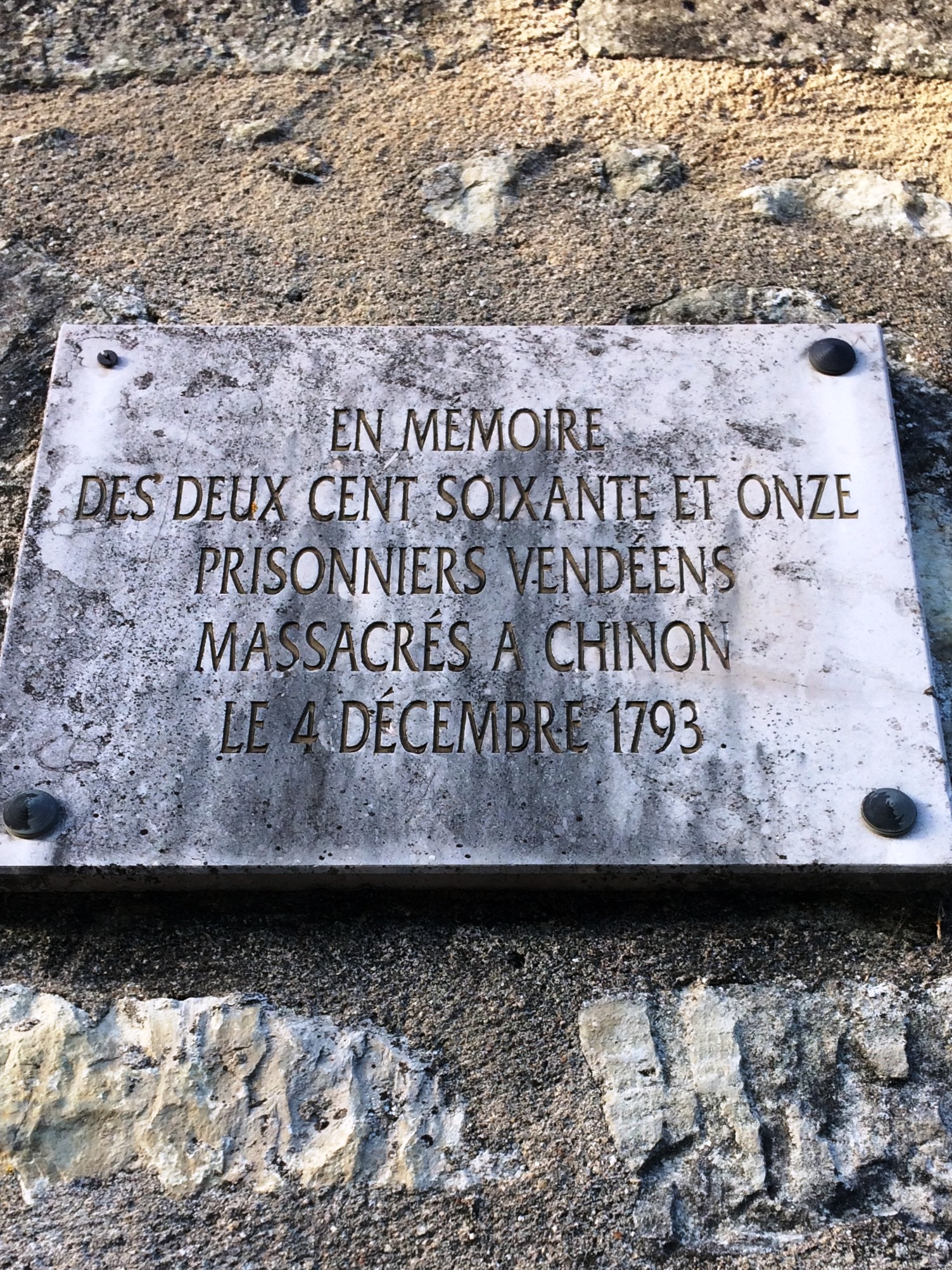 Plaque commémorative du massacre de Vendéens à Chinon